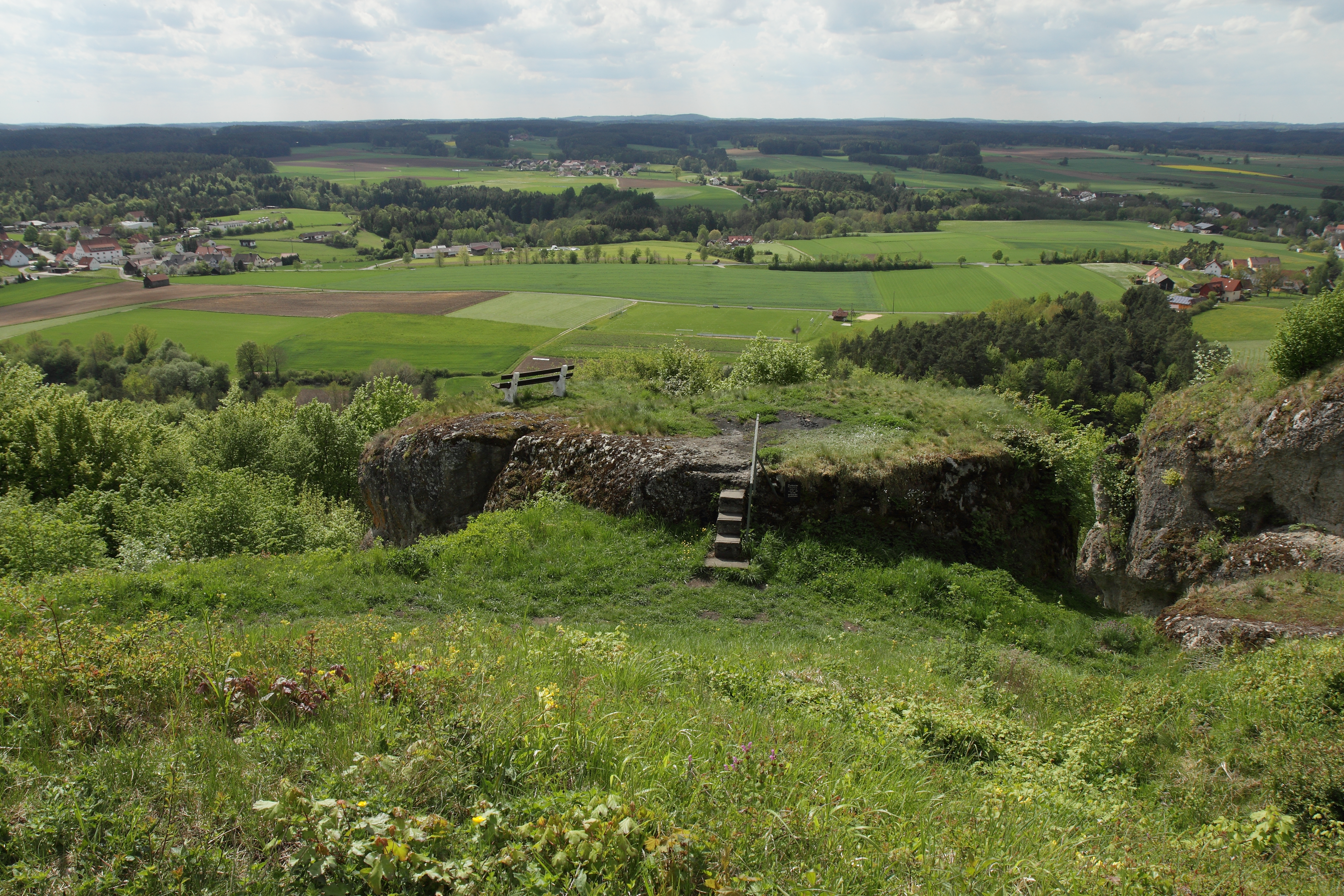 Burgstall Plankenstein - Ausblick von der Burgstelle nach Westen